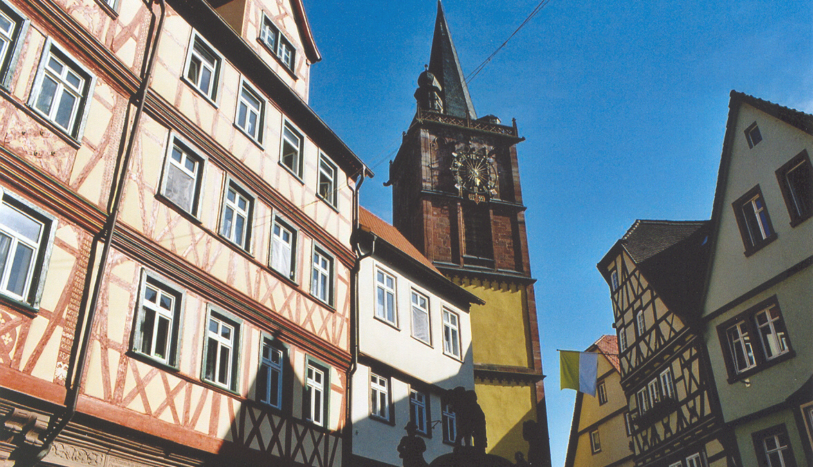 Wertheim : Stadtansicht. Blick durch die Altstadt auf die gotische Stiftskirche.